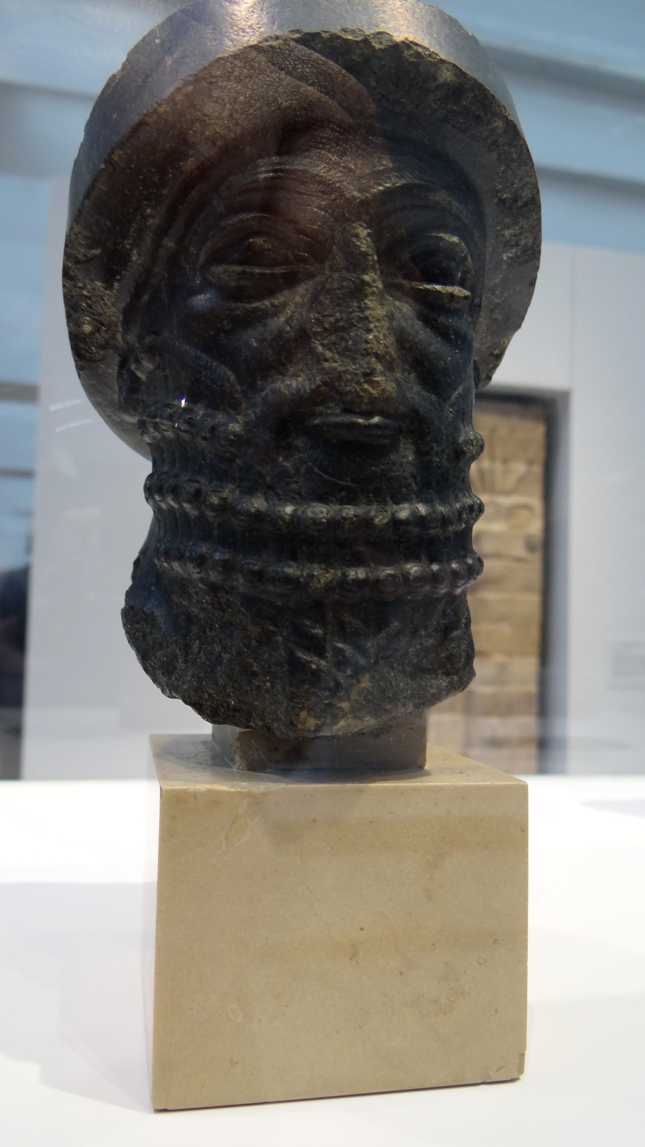 Royal portrait - Hammurabi - King of Babylon -1900 before JC - at Louvre-Lens